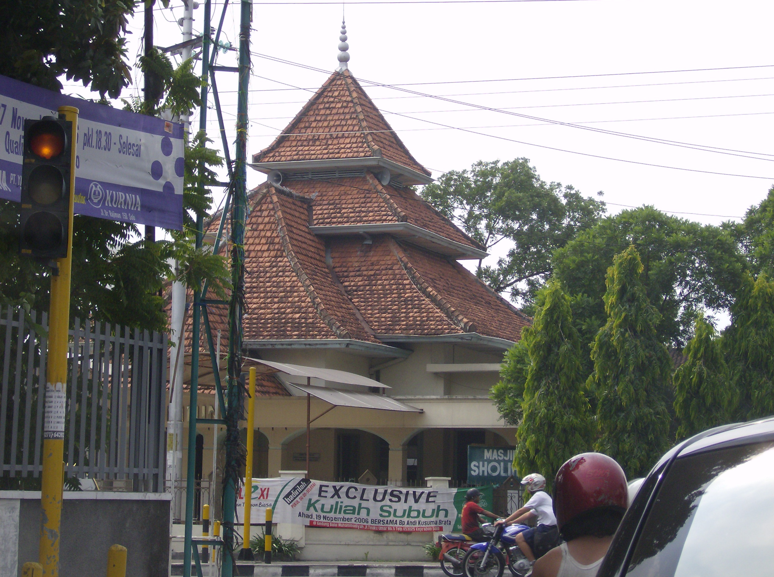 Sholihin Mosque in Surakarta